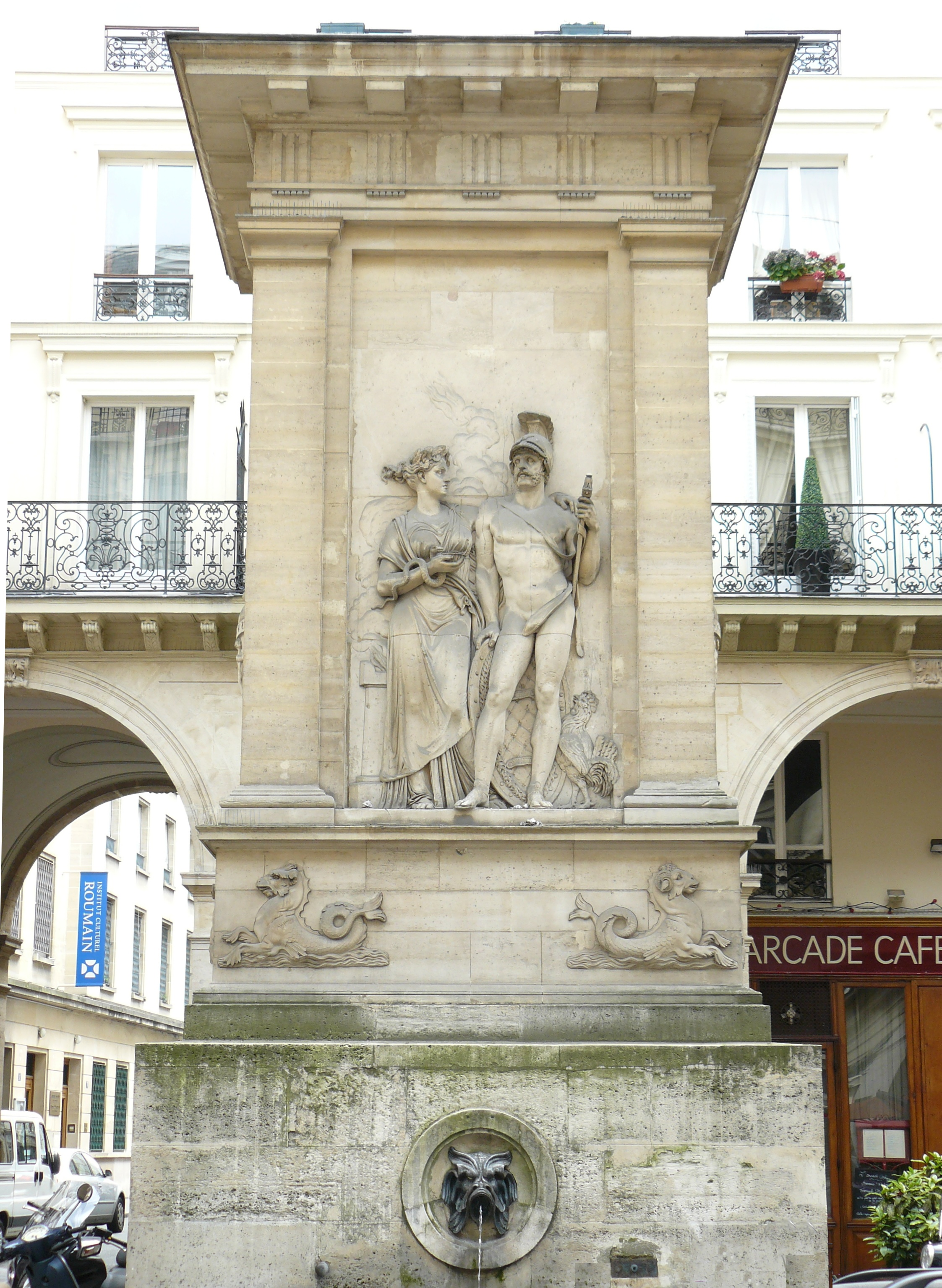 Fontaine de Mars - Rue Saint-Dominique - Paris 7e arrondissement